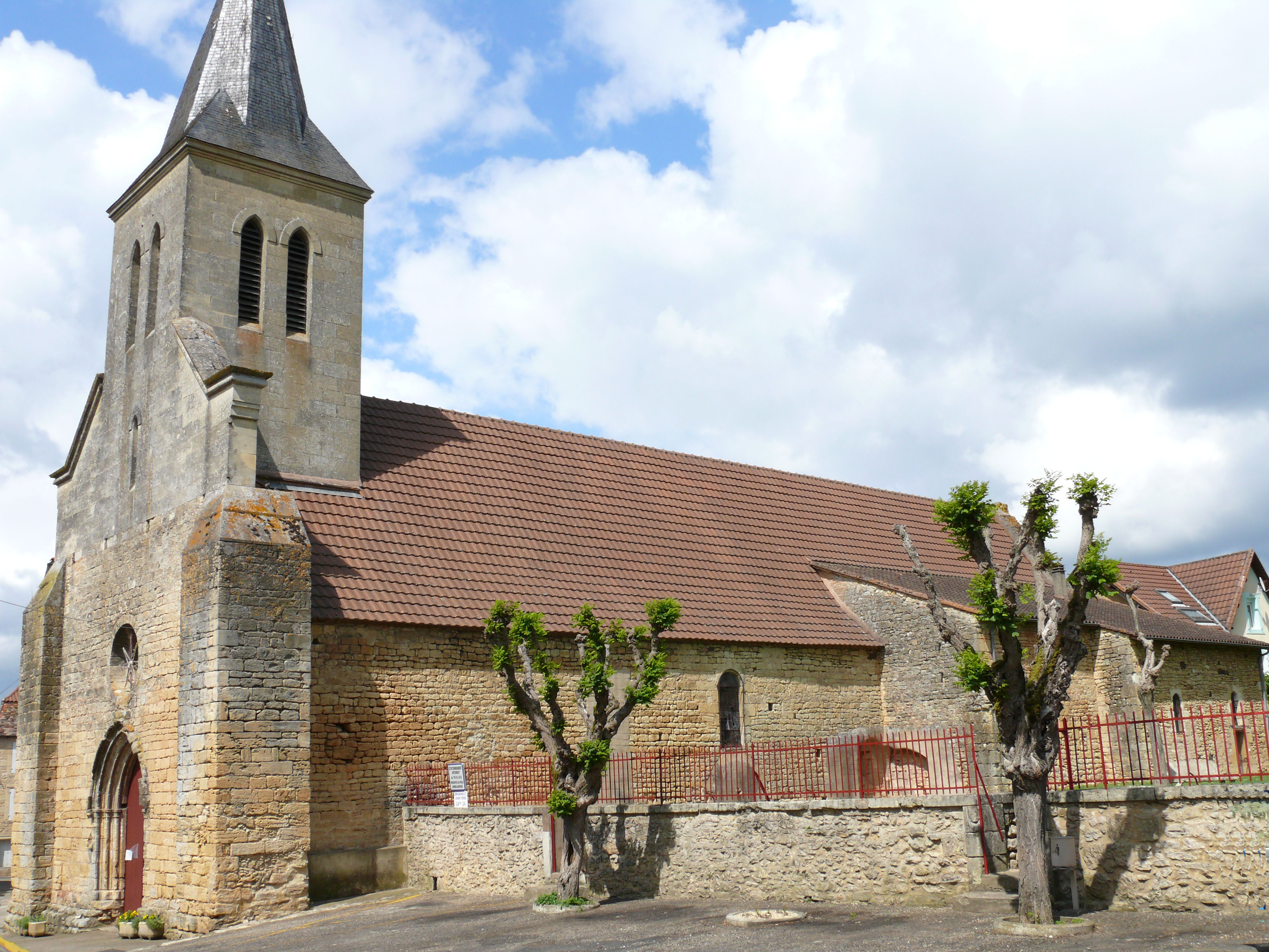 Siorac-en-Périgord - Eglise Saint-Pierre-ès-Liens